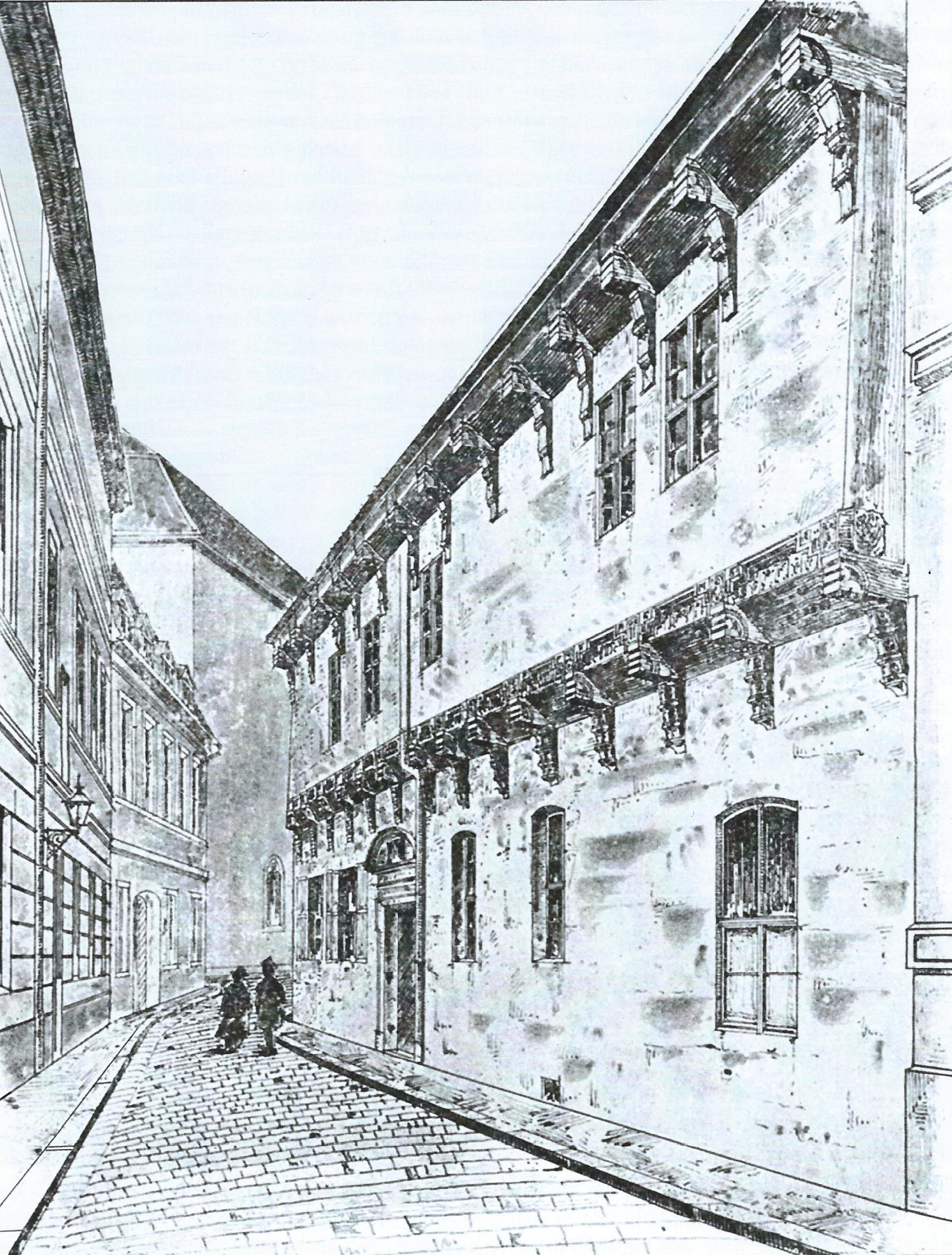 Kreuzgangstraße 5 Blick von Osten, vor dem Umbau von 1899, im Hintergrund alte Nikolaikirche, links: Rückseite der nördlichen Bebauung des Domplatzes (heute Südflügel des Landtages)